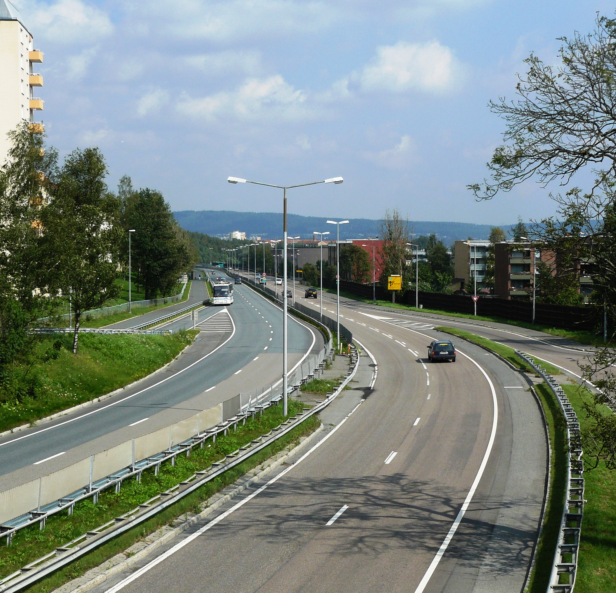 Trondheimsveien, (Rv4) Oslo, from Linderud towards Veitvet